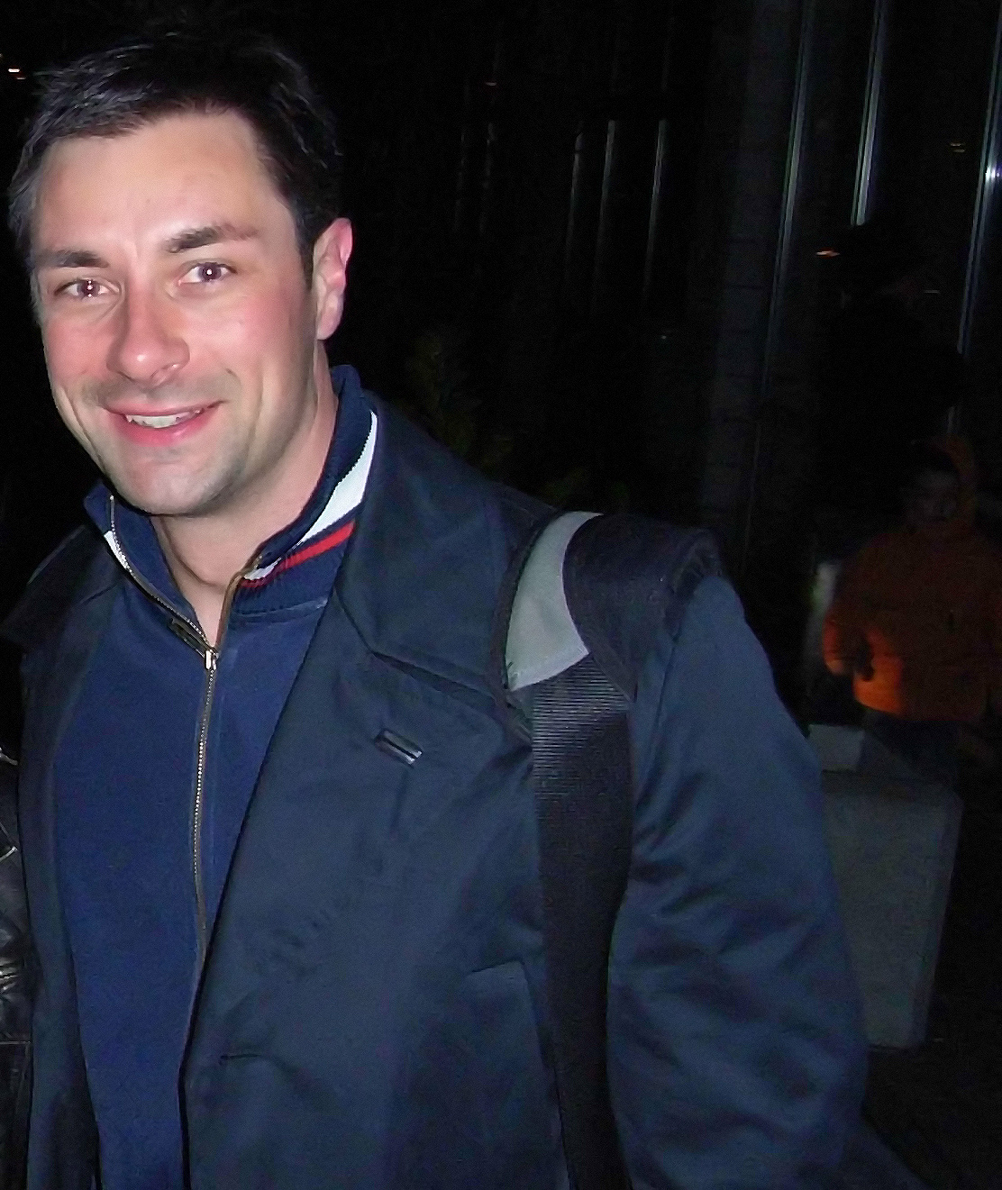 Moderator Marco Schreyl